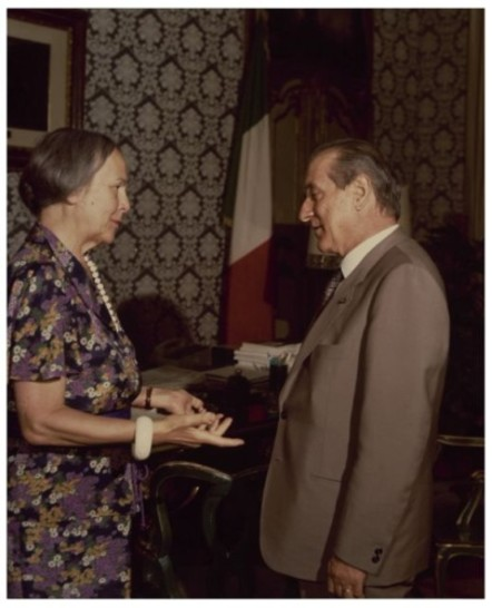 Il Presidente della Camera dei Deputati Nilde Iotti incontra il presidente di Confindustria Luigi Lucchini